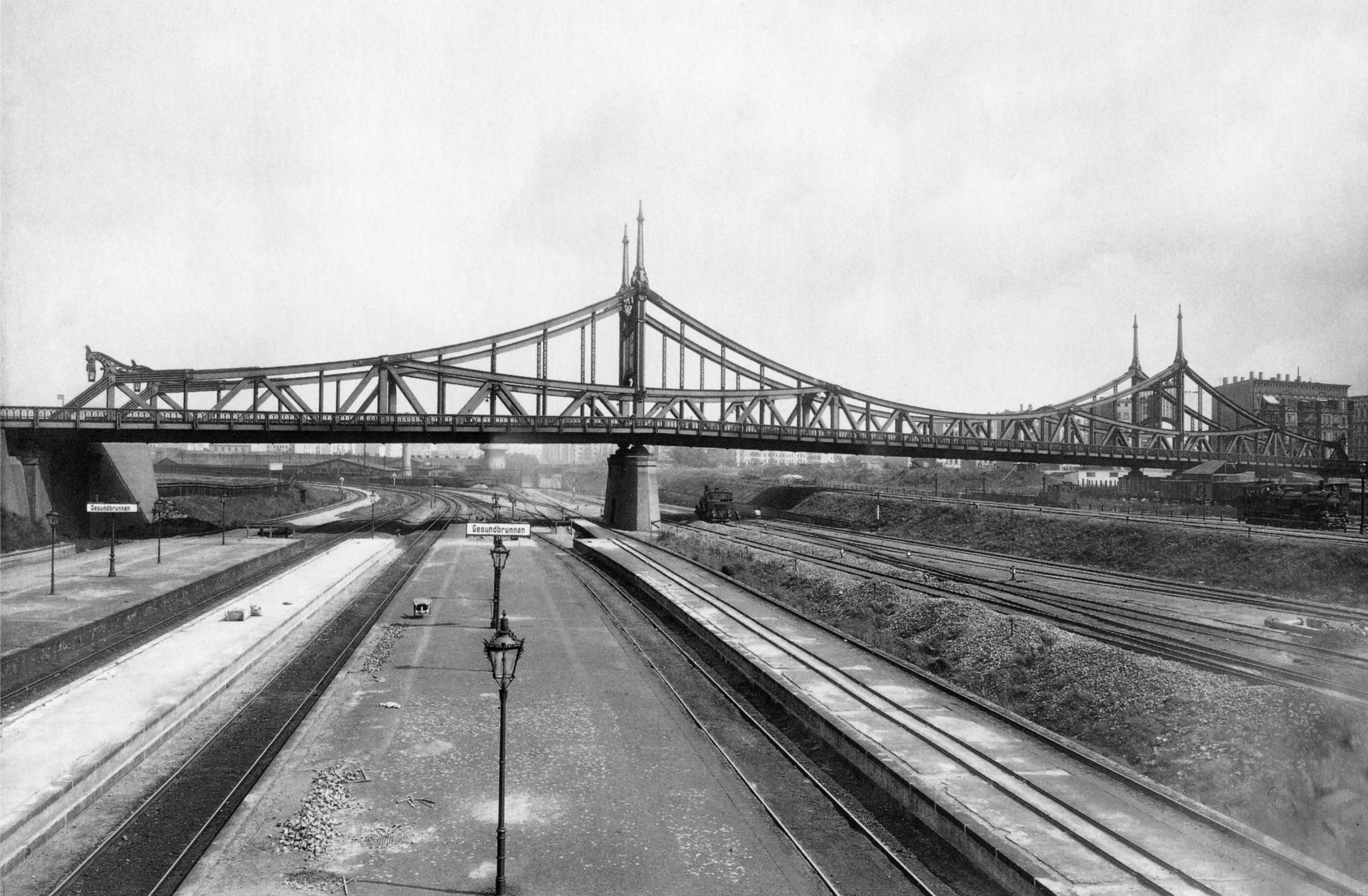 Swindemünder Brücke (im Volksmund auch Millionenbrücke), Straßenbrücke über die Ringbahn, Nordbahn und Stettiner Bahn in Berlin-Gesundbrunnen, Swinemünder Straße - Bellermannstraße, 1902-1905 von Bruno Möhring